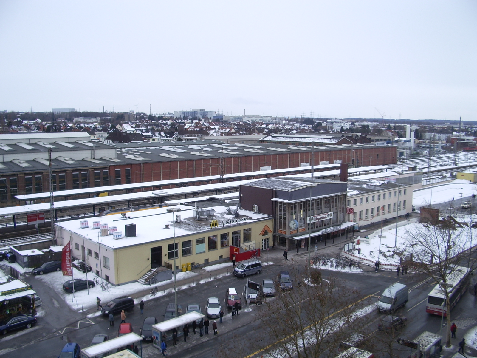 Paderborn Hauptbahnhof im Februar 2010, fotografiert von der gegenüberliegenden Agentur für Arbeit aus. Die Bauarbeiten zum Ausbau der Bahnhofstraße haben, von Westen (rechts im Bild) kommend, den Bereich vor dem Haupteingang zum Bahnhofsgebäude erreicht.